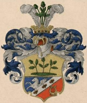 Middendorffi suguvõsa aadlivapp